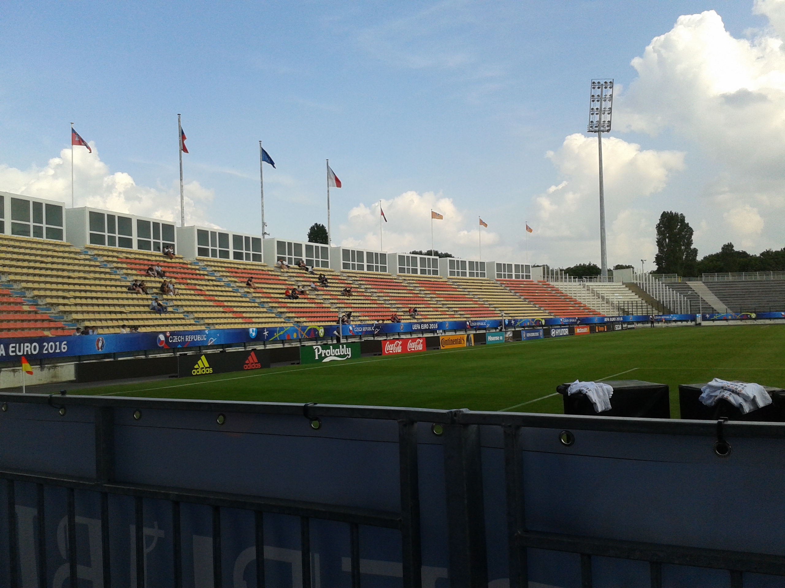 Photo de la tribune première du Stade de la Vallée du Cher, à Tours, lors de l'Euro 2016, le 8 juin 2016